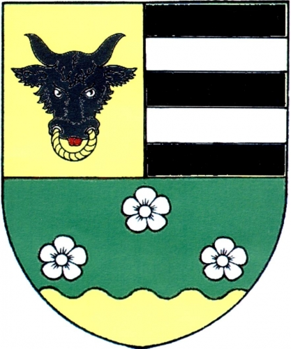 znak,Strachujov , okres Žďár nad Sázavou